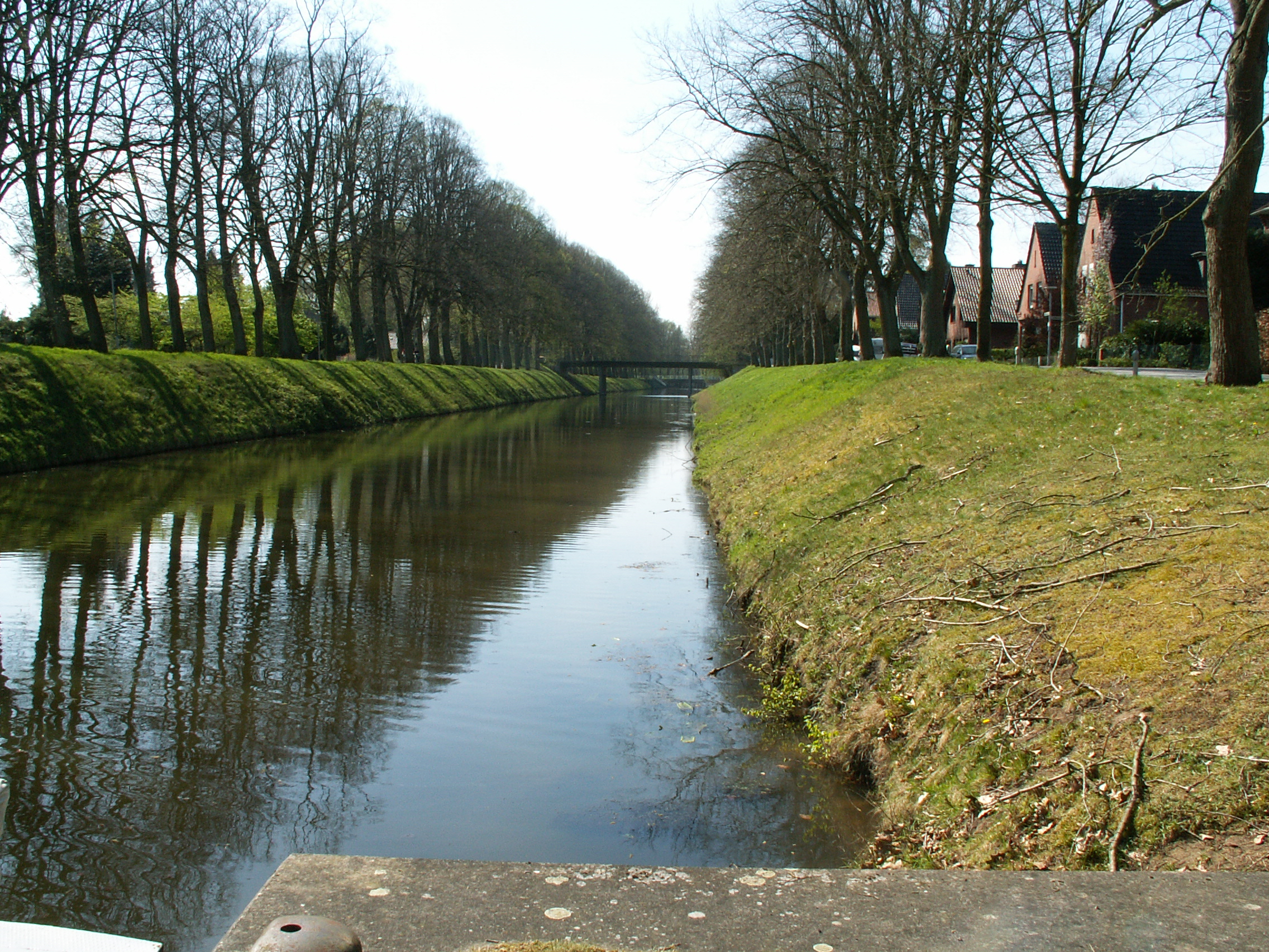 Verbindungskanal Nordhorn Ems-Vechte Kanal Linksemsisches Kanalnetz